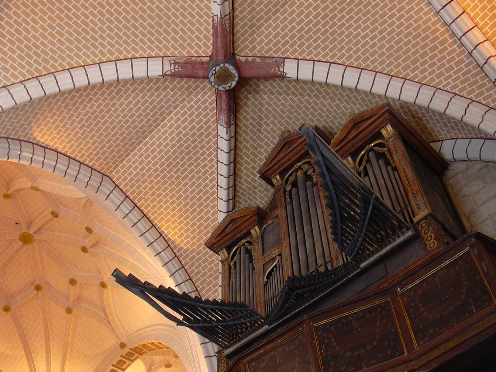 Aragonés: organo d'a Ilesia de Sant Lorient de Magallón